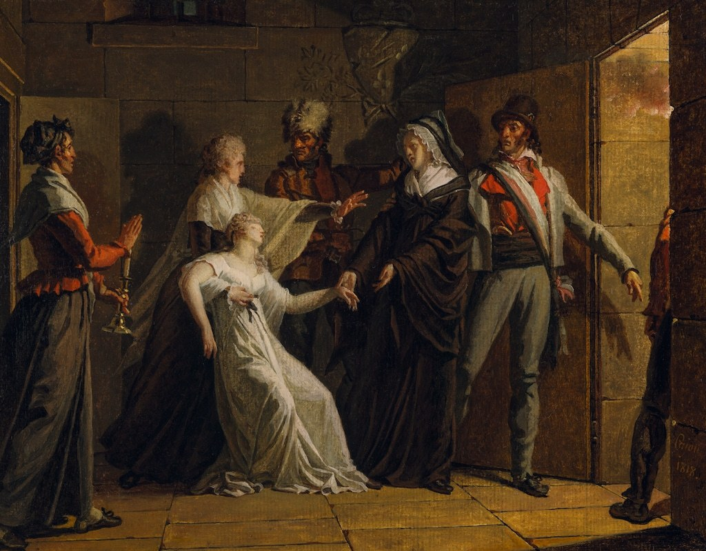 Marie Antoinette séparée de sa famille au temple, par Jacques Augustin Pajou.